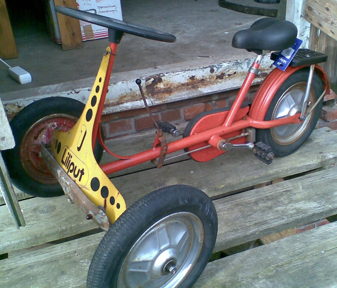 Kinderfahrzeug Liliput von VEB Sitzmöbelwerk Halberstadt